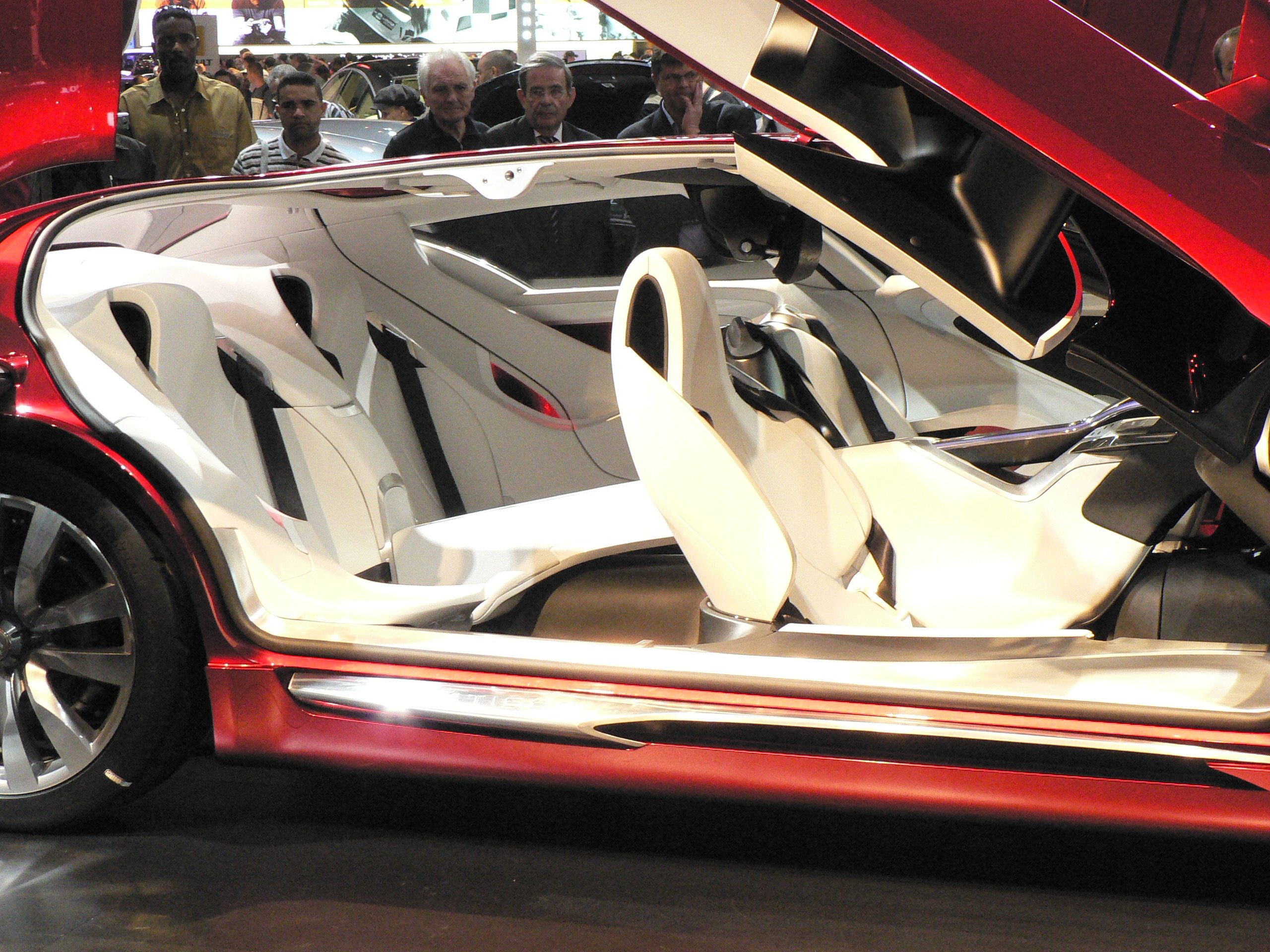 Mondial de l automobile de Paris (October 2006)